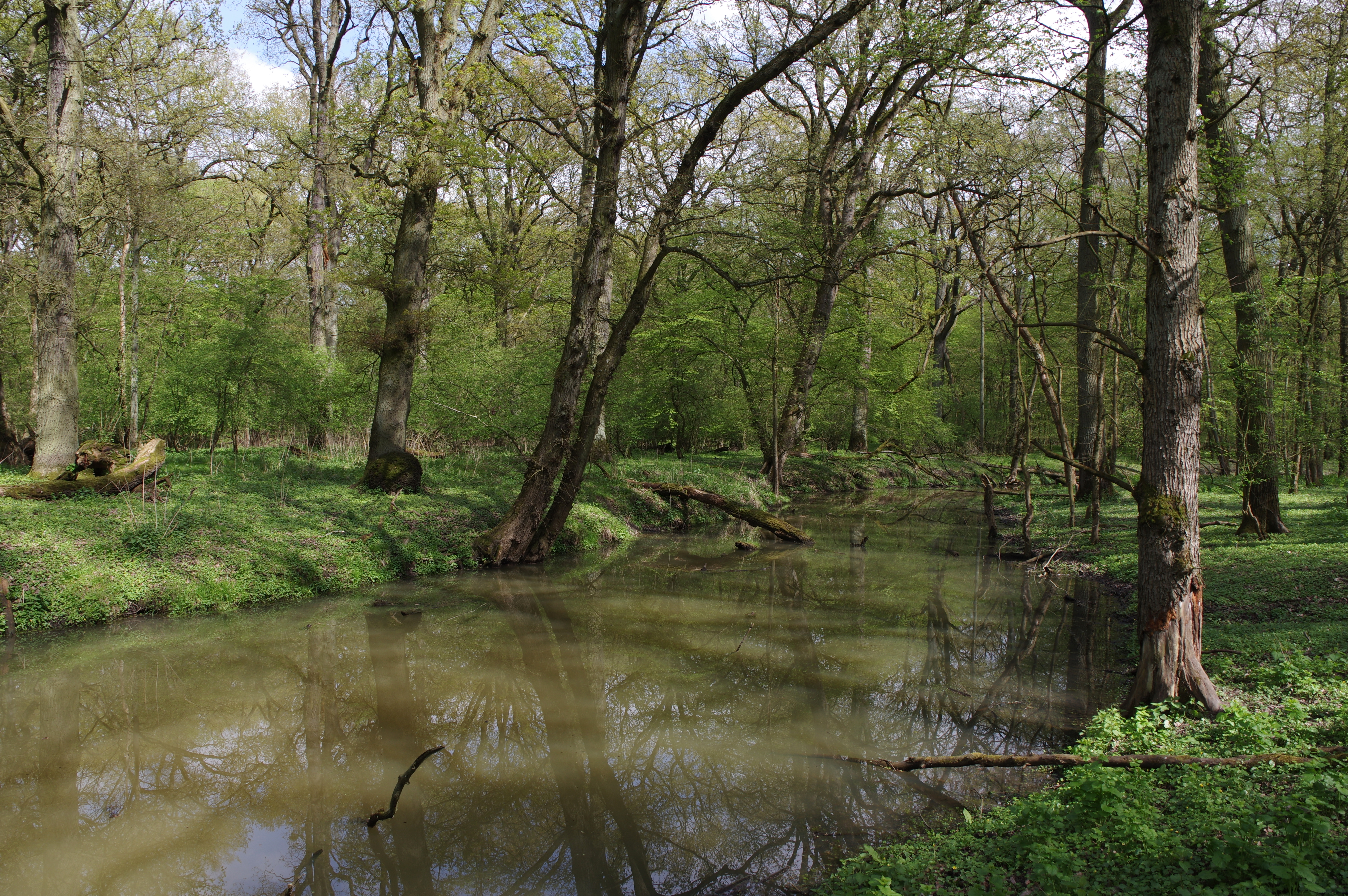 Brandenburgs größter Hartholzauenwald im Überflutungsgebiet der Oder südlich Frankfurt (Brandenburg) mit zeitweilig wasserführender Flutrinne. Geschützt als NSG und FFH-Gebiet "Eichwald und Buschmühle". Bestandteil des SPA-Gebiets "Mittlere Oderniederung".